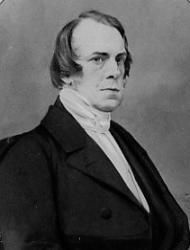 German geologist Heinrich Georg Bronn (1800-1862)